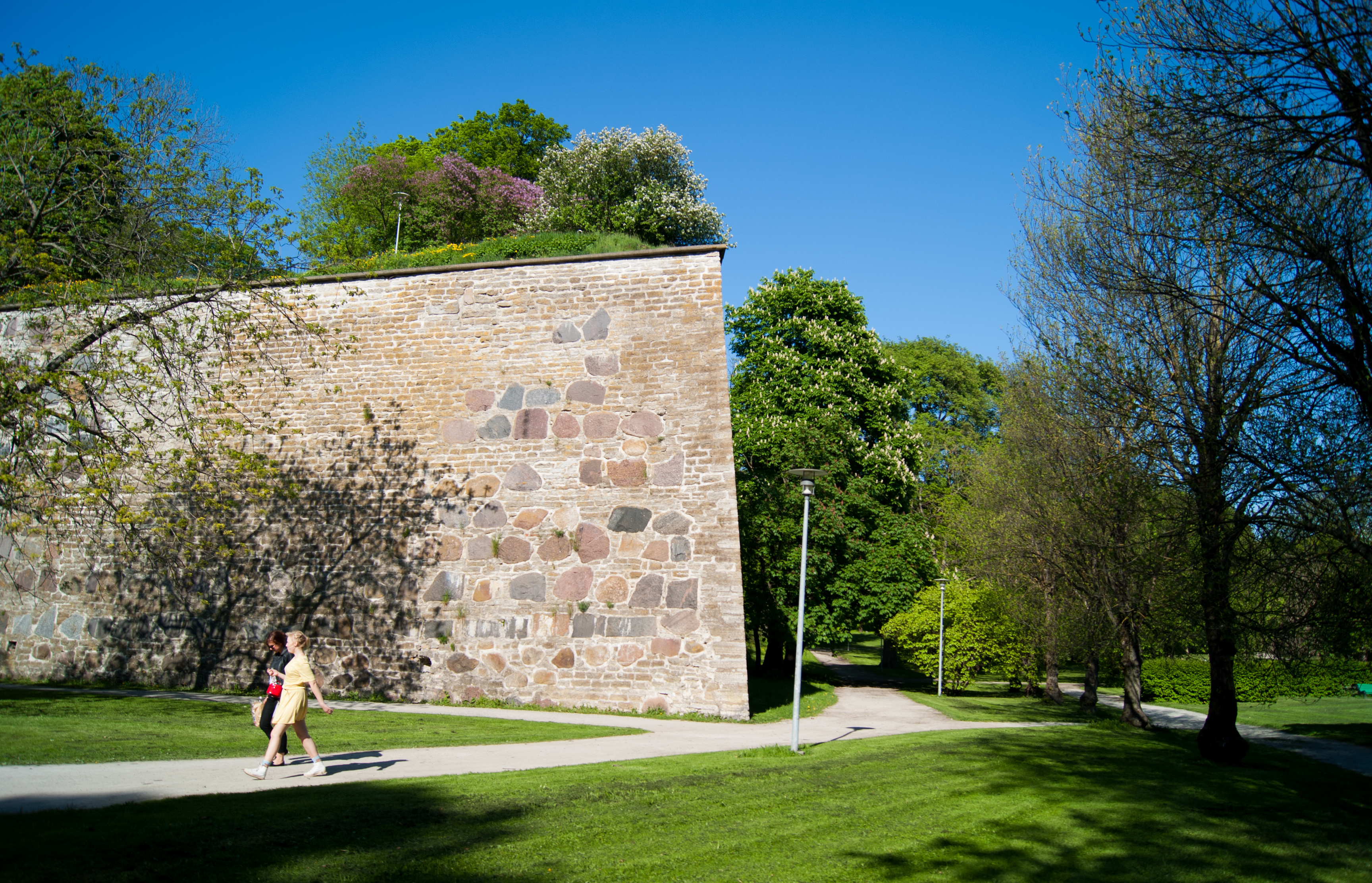 Hirvepark